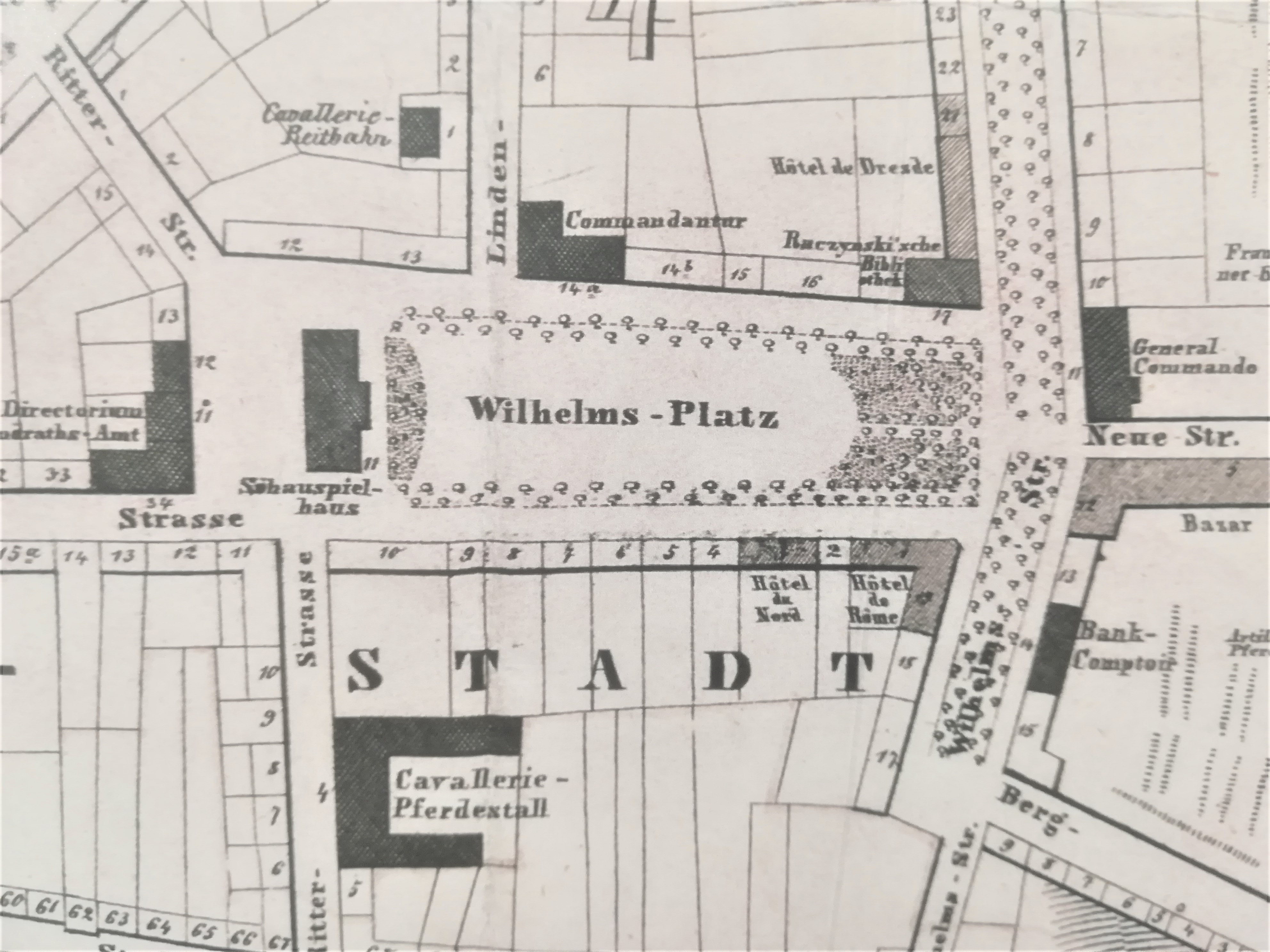 mapa Corvinusa z 1856 r. - Poznań, pl. Wolności.